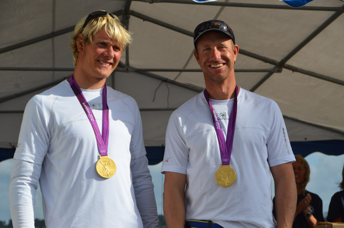 Seglarna Fredrik Lööf och Max Salminen med OS-guld runt halsen.